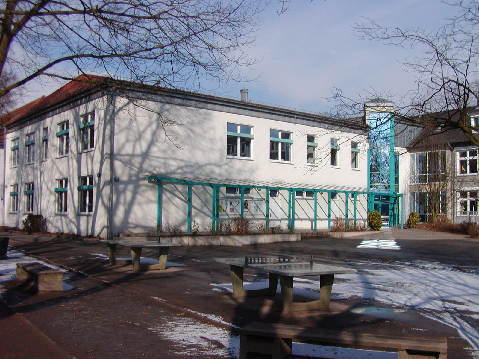 Eingang der Hauptschule in Minden-Todtenhausen, Nordrhein-Westfalen.